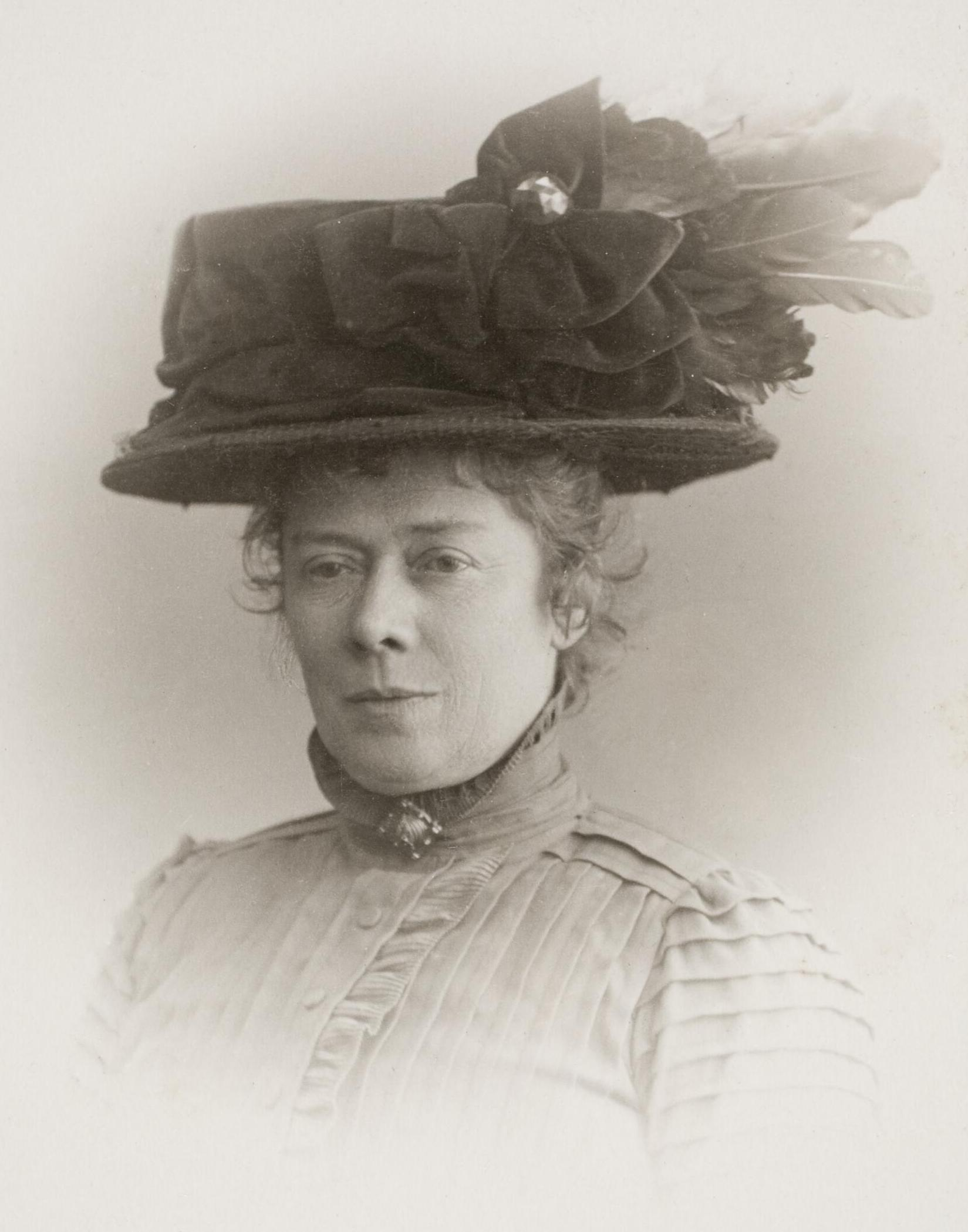 Portret van Suze Bisschop-Robertson